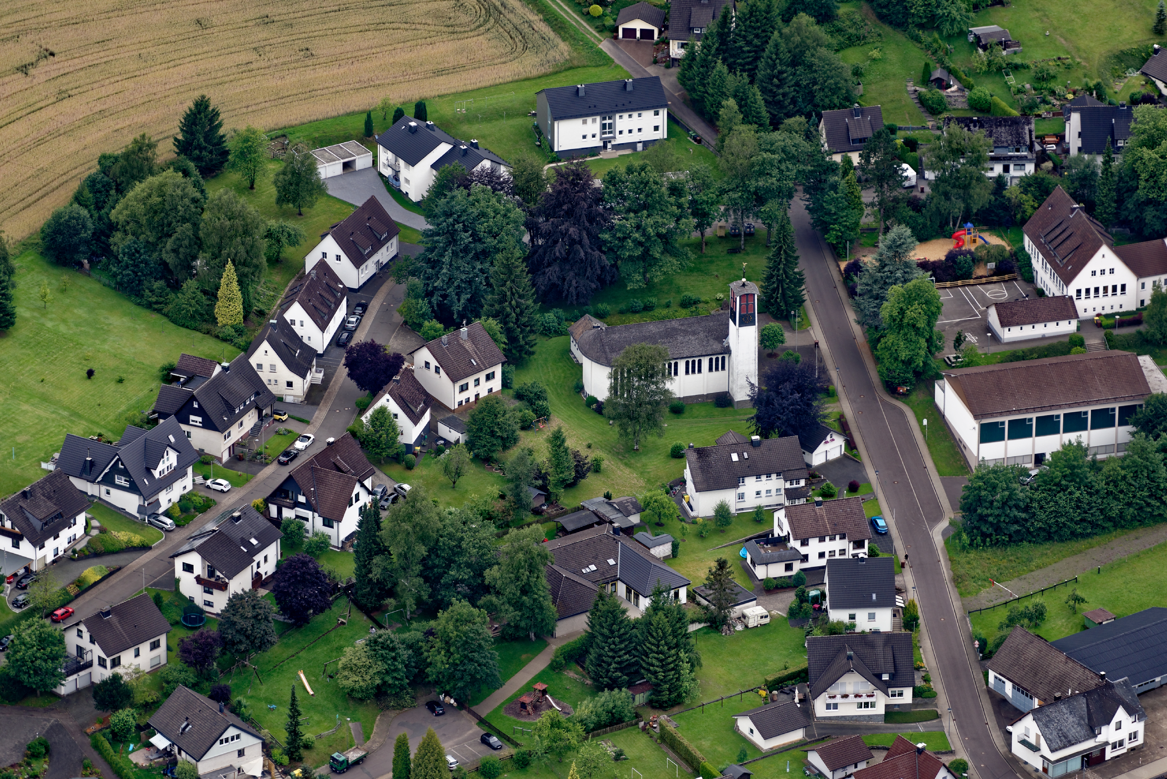 Fotoflug Sauerland West. Luftaufnahme: Katholische Kirche Maria Geburt in Drolshagen-Hützemert, Nordrhein-Westfalen